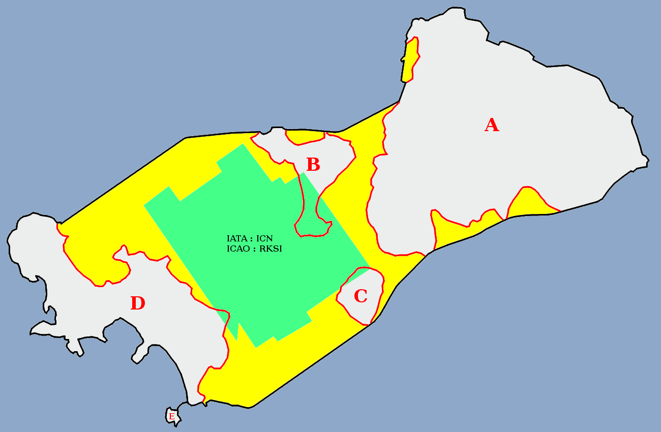 영종도의 지역 구분 (구분 : A:영종도, B:ko:삼목도, C:ko:신불도, D:ko:용유도, E:ko:잠진도, 황색:간척지, 녹색:ko:인천국제공항, SVG로 만들 수 있는 분 계시면 변환해서 공용에도 올려주십시오)